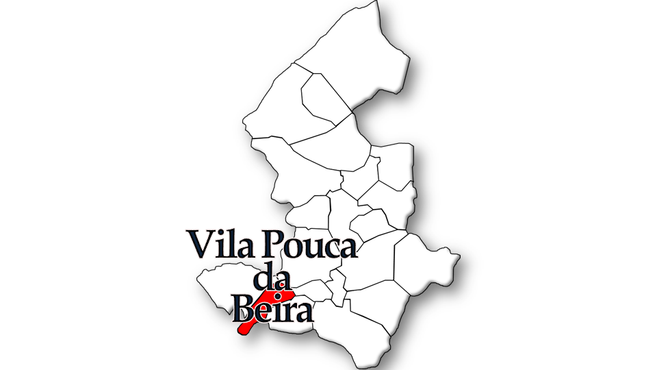 População